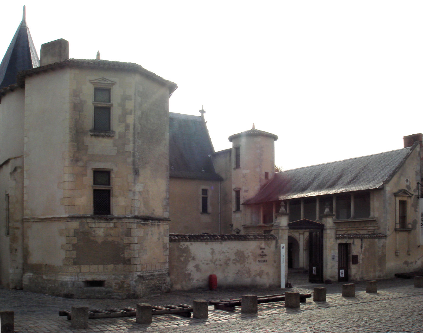 Hotel De Clerjotte, Saint Martin de Re